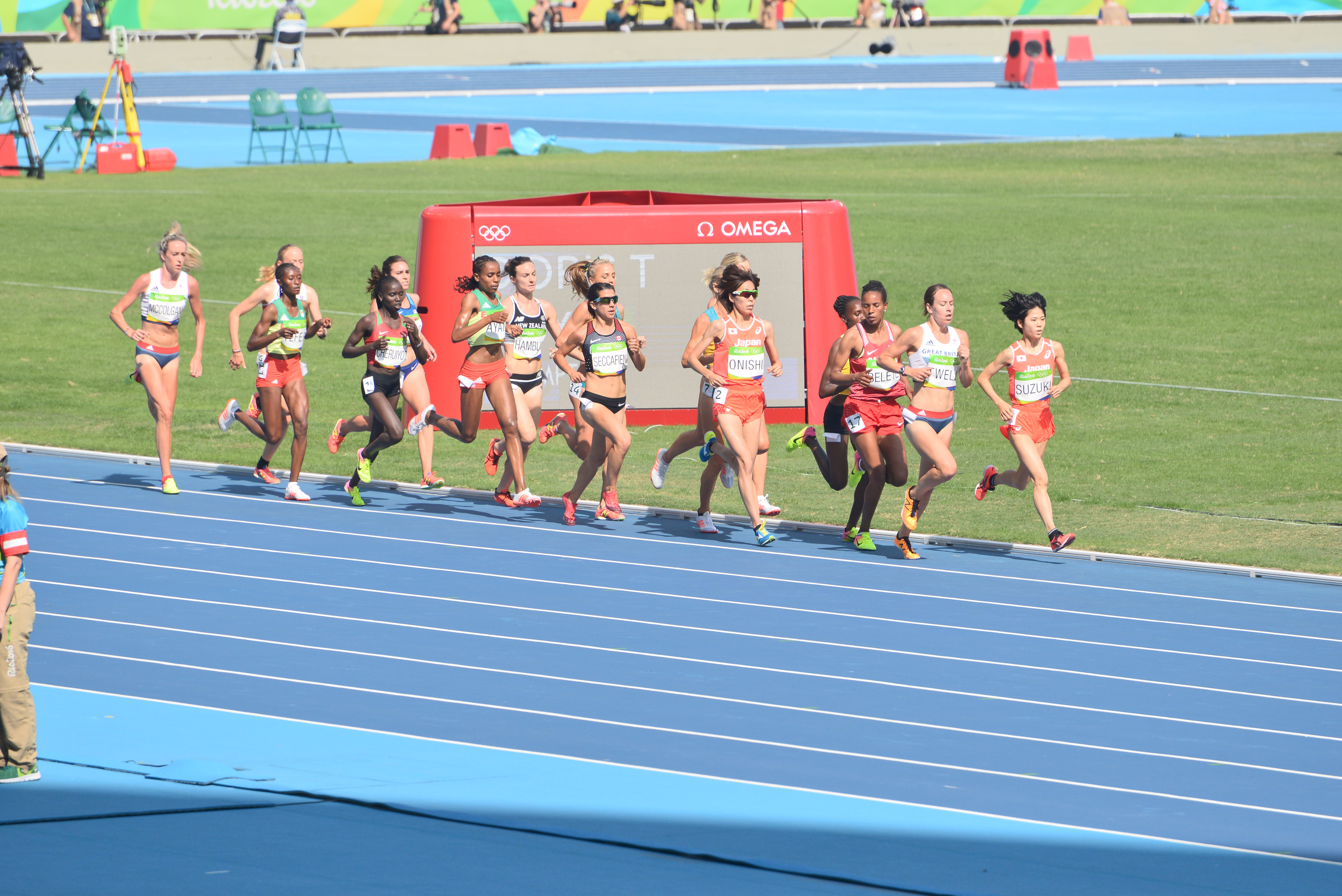 Série du 5000m féminin de Rio 2016